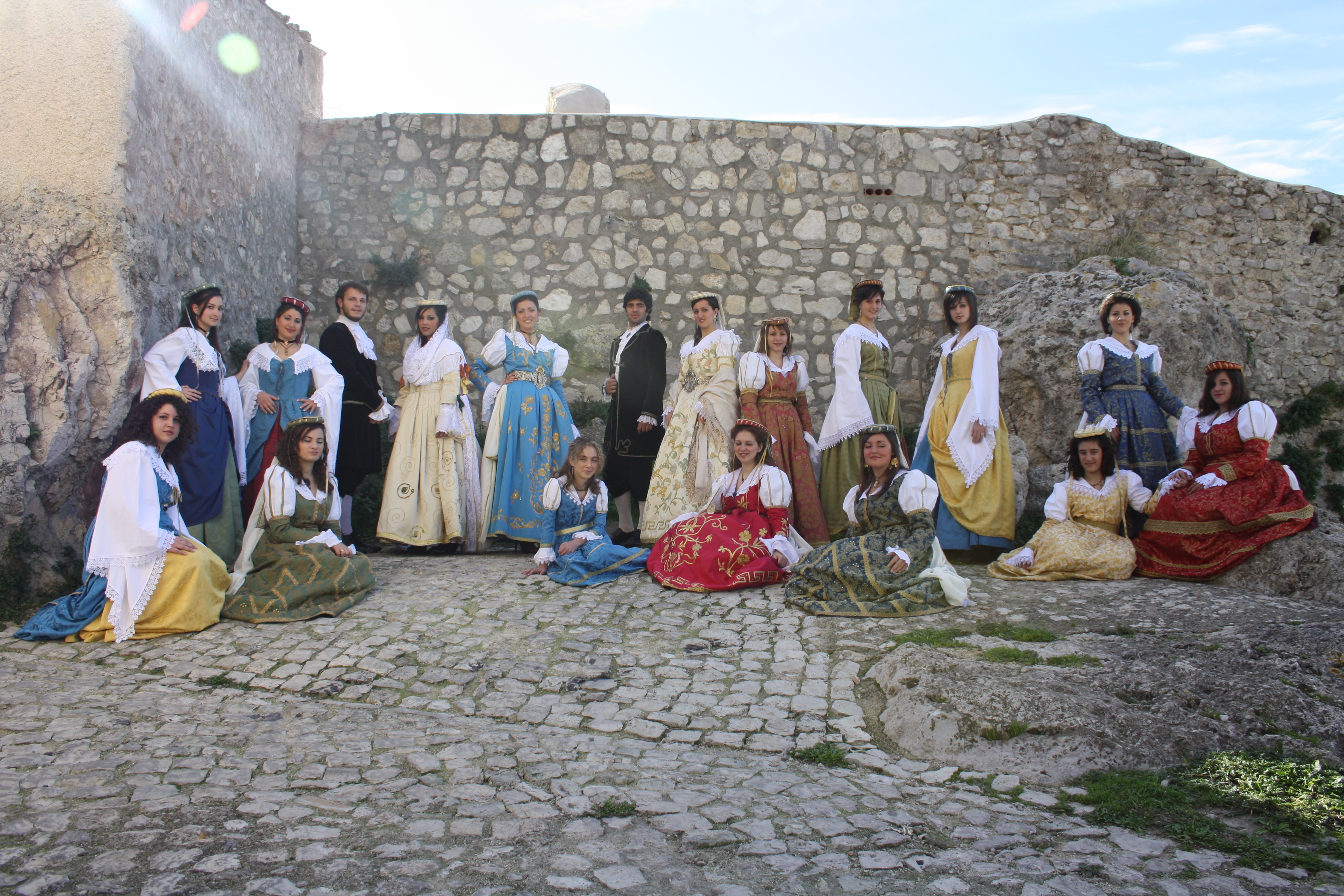 Costumi albanesi di Palazzo Adriano, ripresi recentemente su lo stile di quelli antichi e su quelli di Piana degli Albanesi